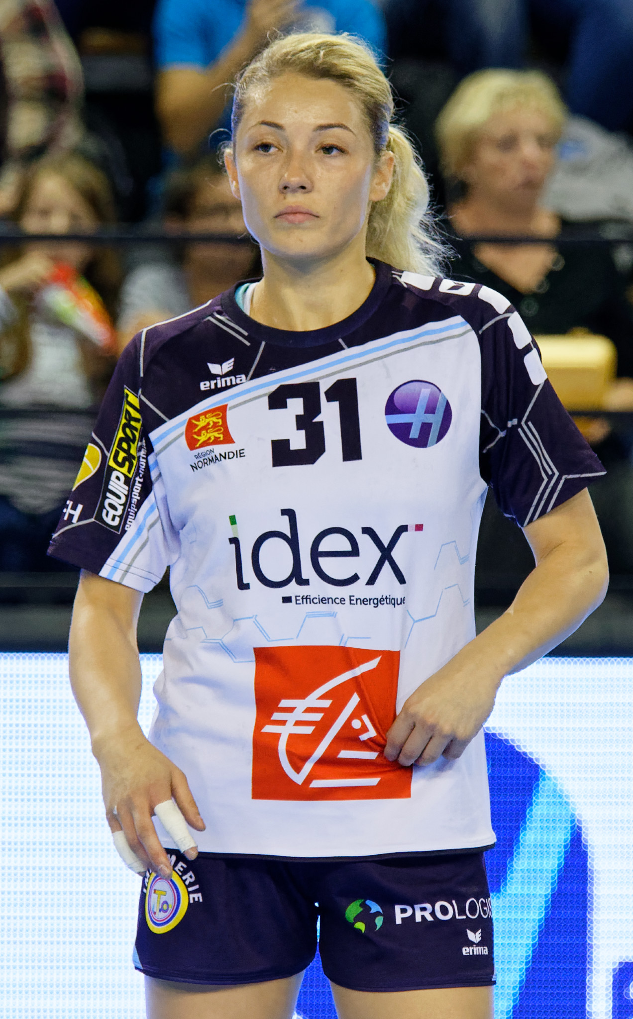 Rencontre entre Issy Paris Hand et Le Havre. A Boulogne-Billancourt, le 07 octobre 2017.